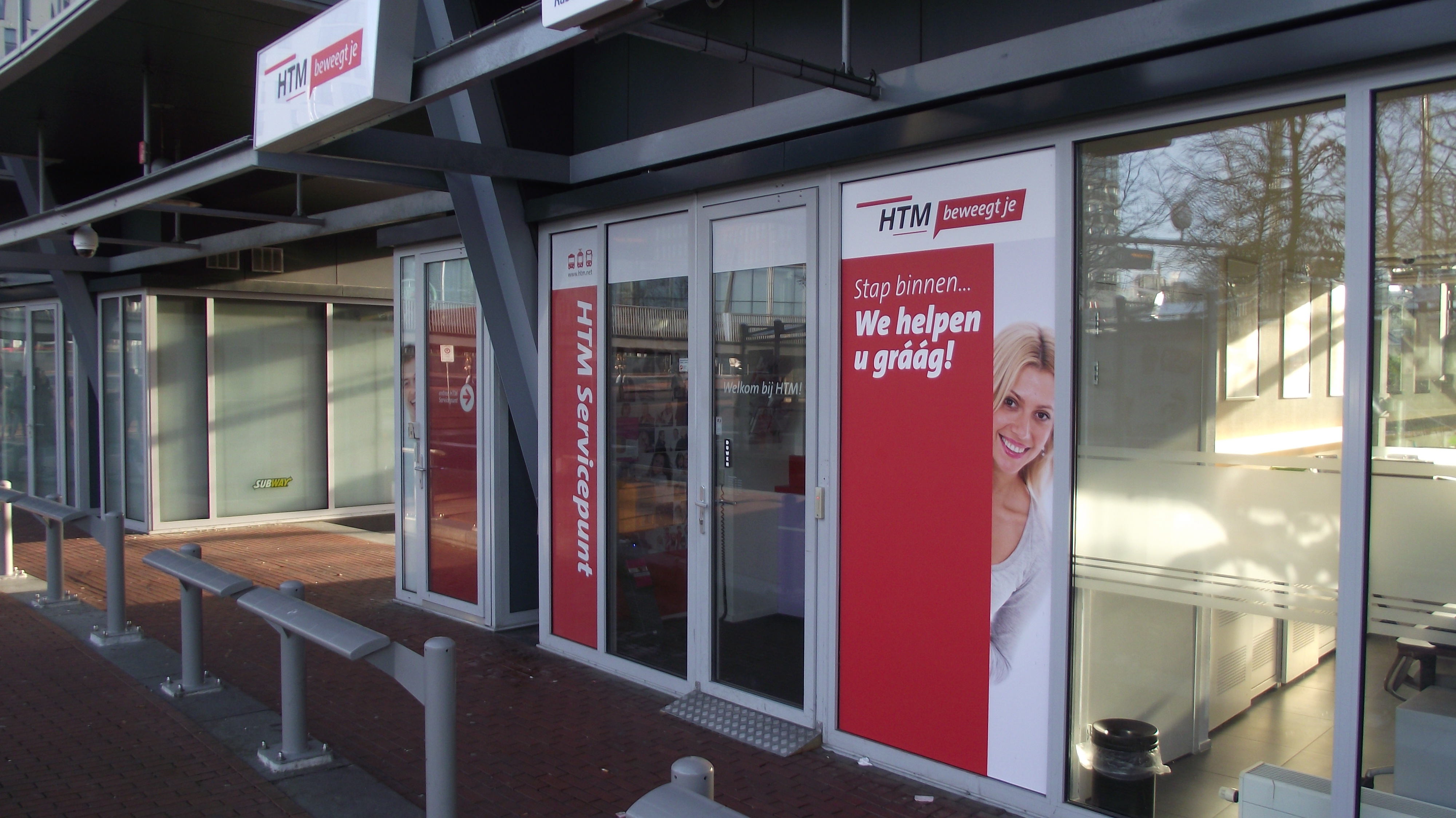 HTM verkoopkantoor in Zoetermeer bij het busstation